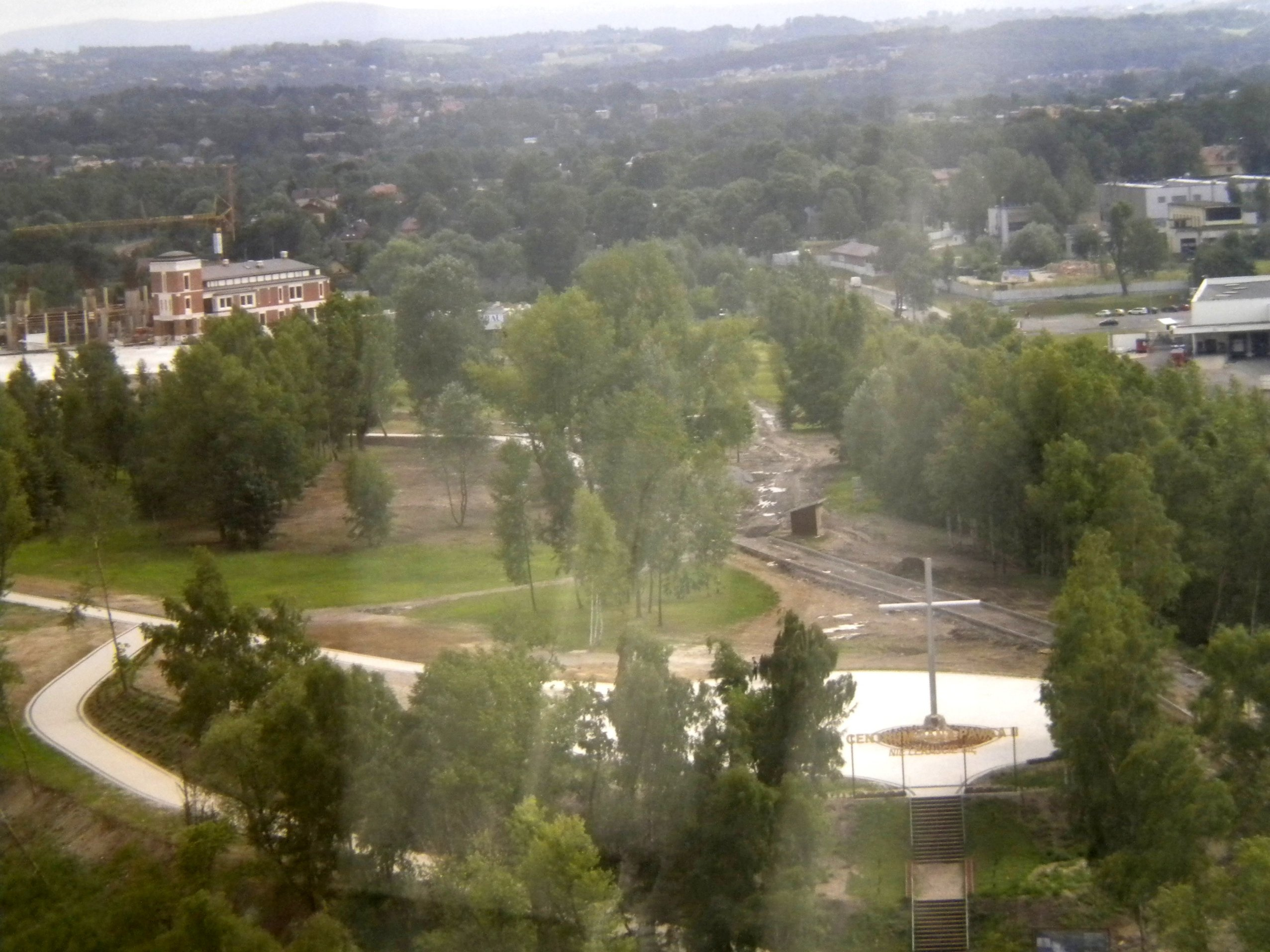 Centrum Jana Pawła II na obszarze tzw. "Białych Mórz" w Krakowie-Łagiewnikach ( w budowie - stan z lipca 2011)